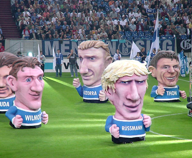 Köpfe berühmter Spieler des Fußballvereins FC Schalke 04 als tragbare Großplastiken. Foto und Großplastiken von Jacques Tilly.